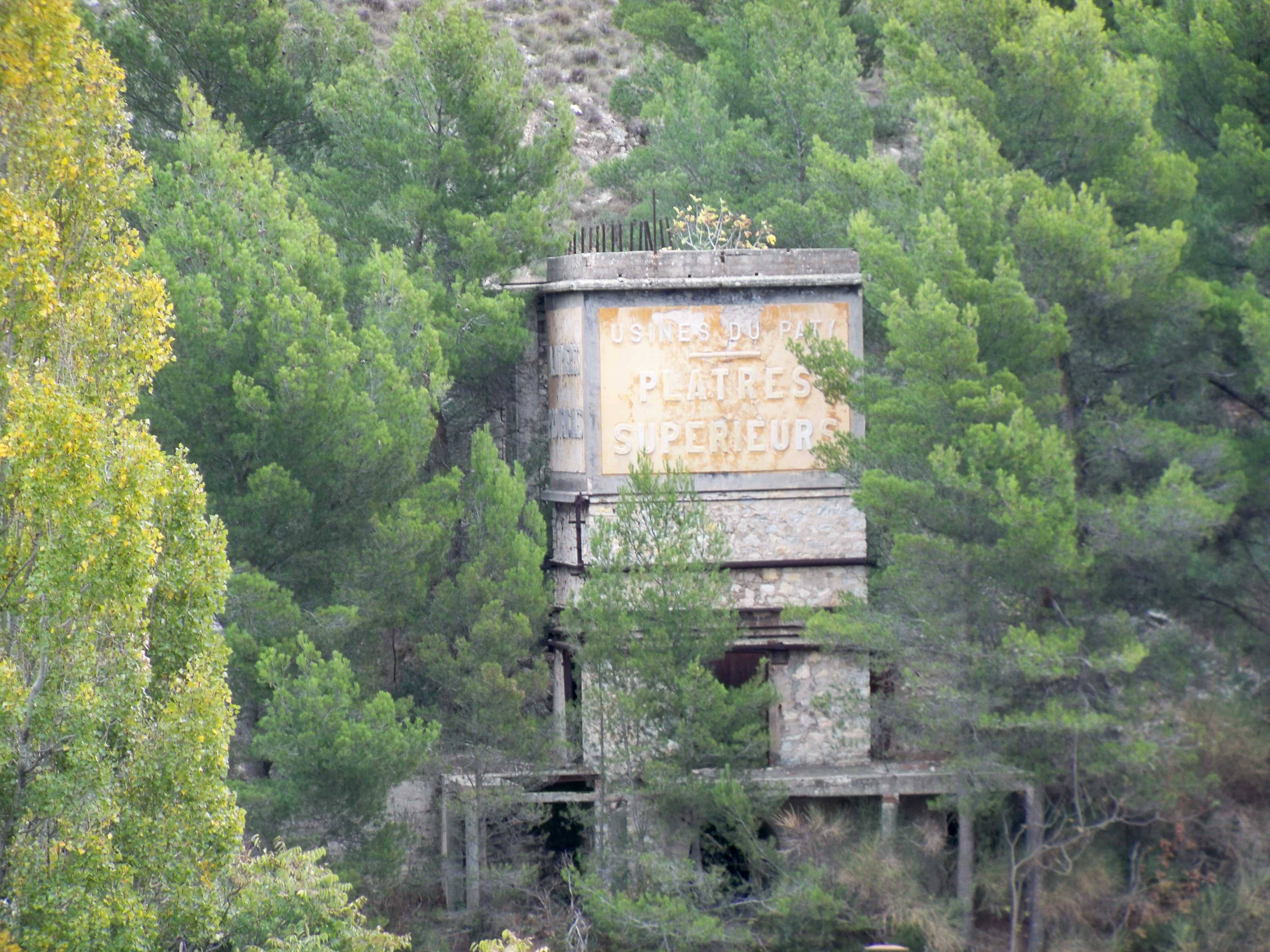 Batiment de l'usine du Paty